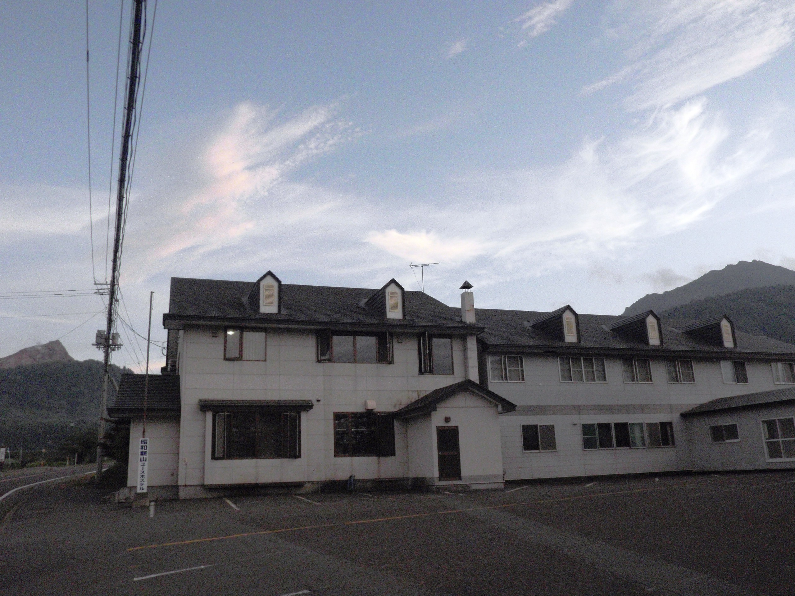 昭和新山ユースホステル。左に見えるのは昭和新山、右に見えるのが有珠山。